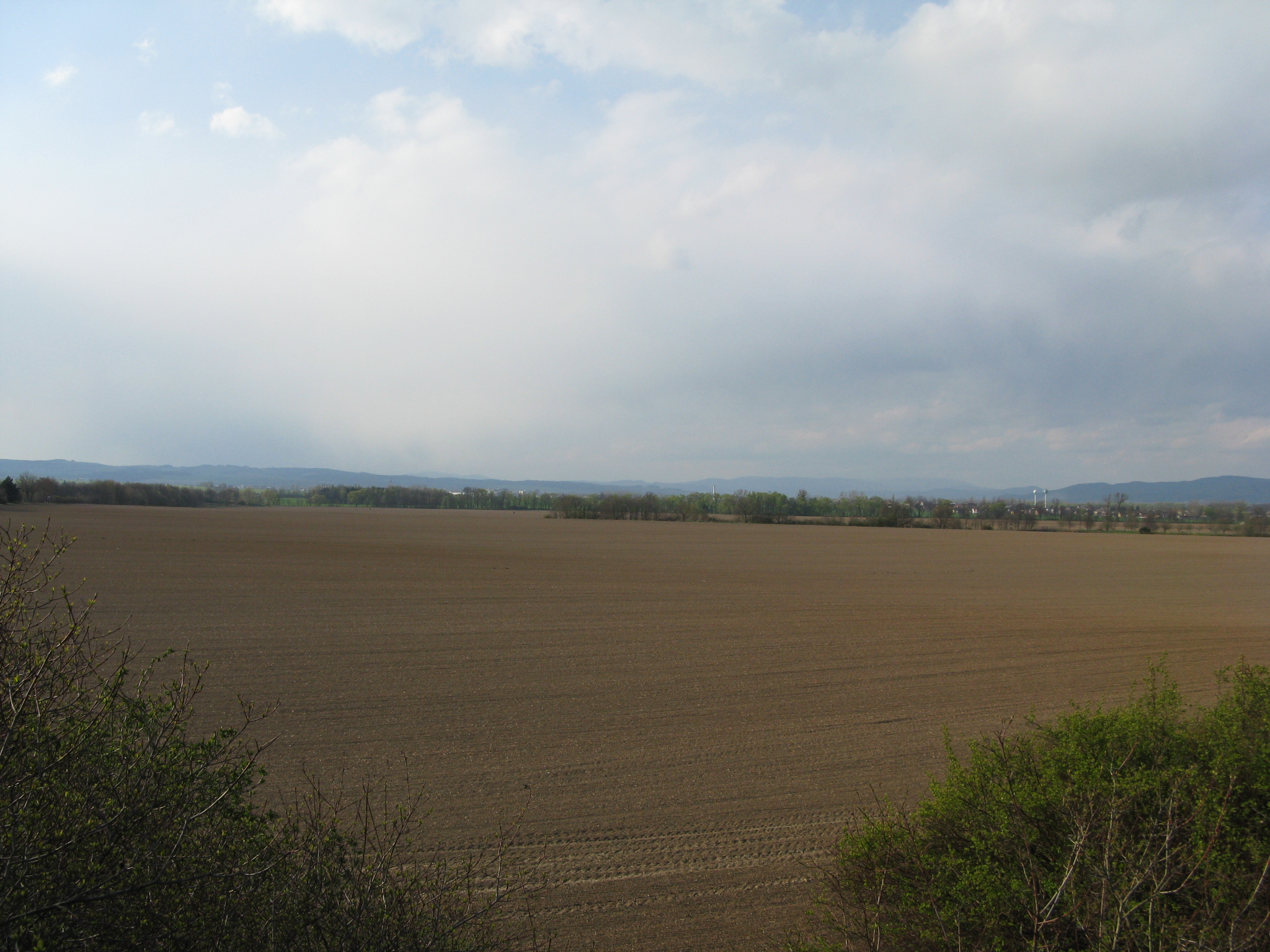 Česky: MB-pohled S směrem (od Palonína)